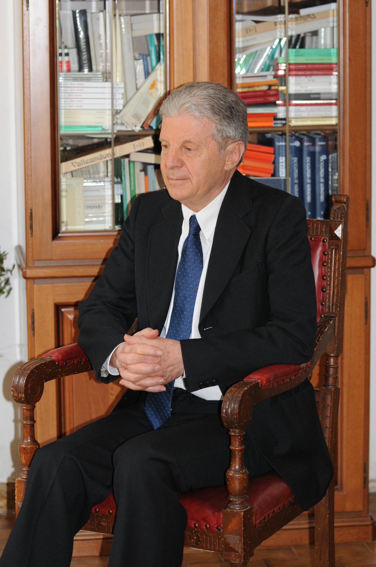 Luigi Berzano, professore emerito - Università degli Studi di Torino